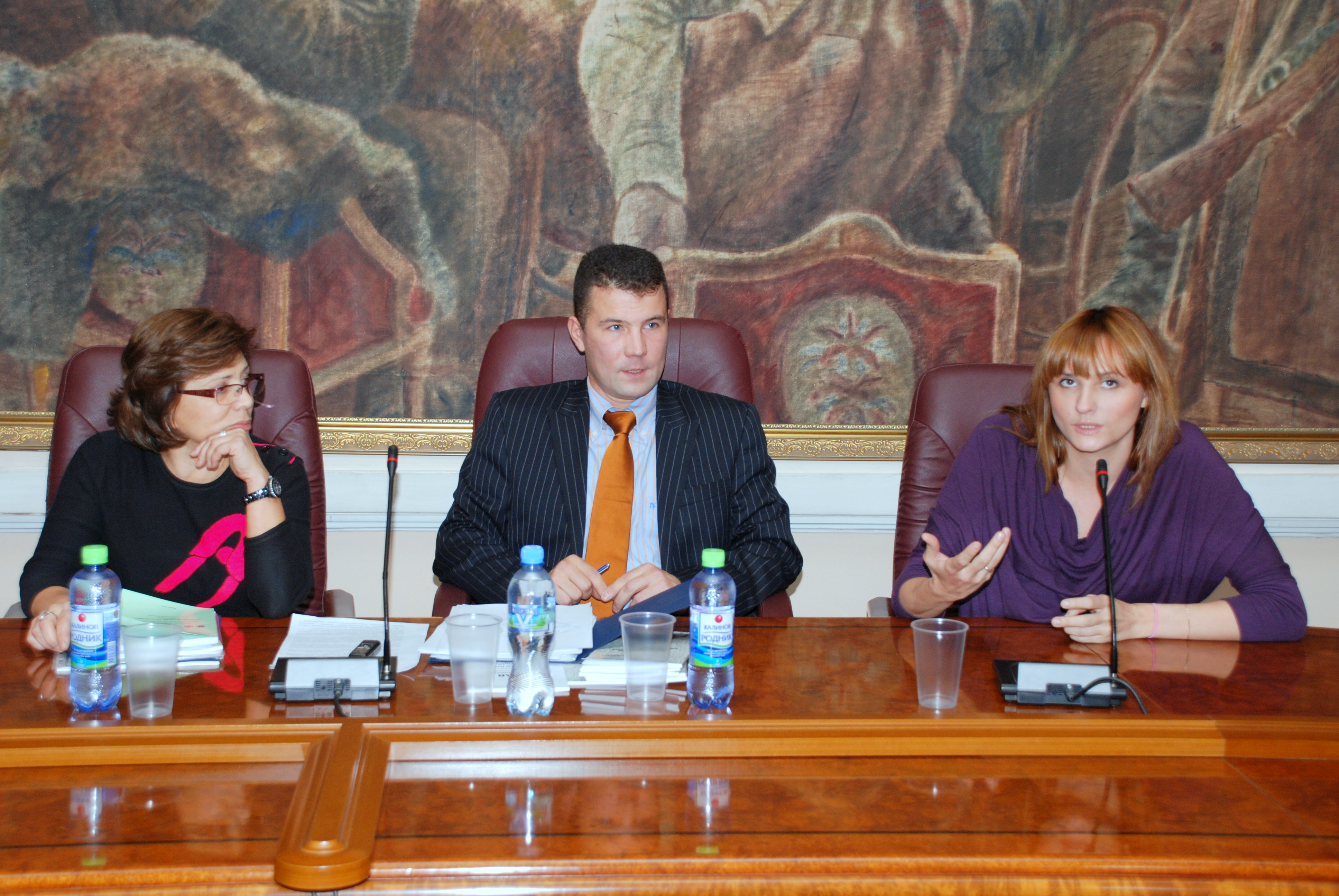 Заседание Комиссии по спортивному праву по вопросам социальной адаптации спортсменов